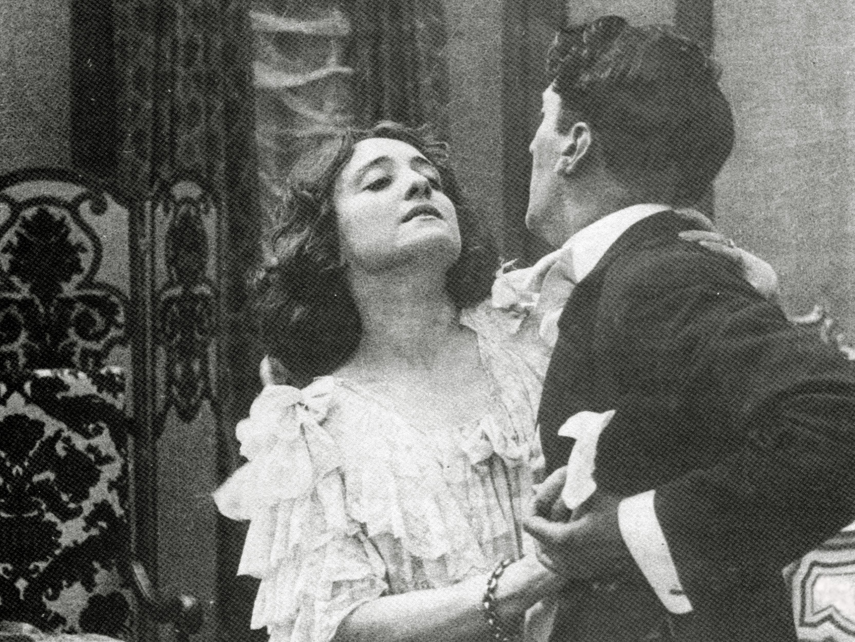 Ma l amor mio non muore (Caserini 1913) - prod.. "Gloria film Torino" - Lyda Borelli e Mario Bonnard